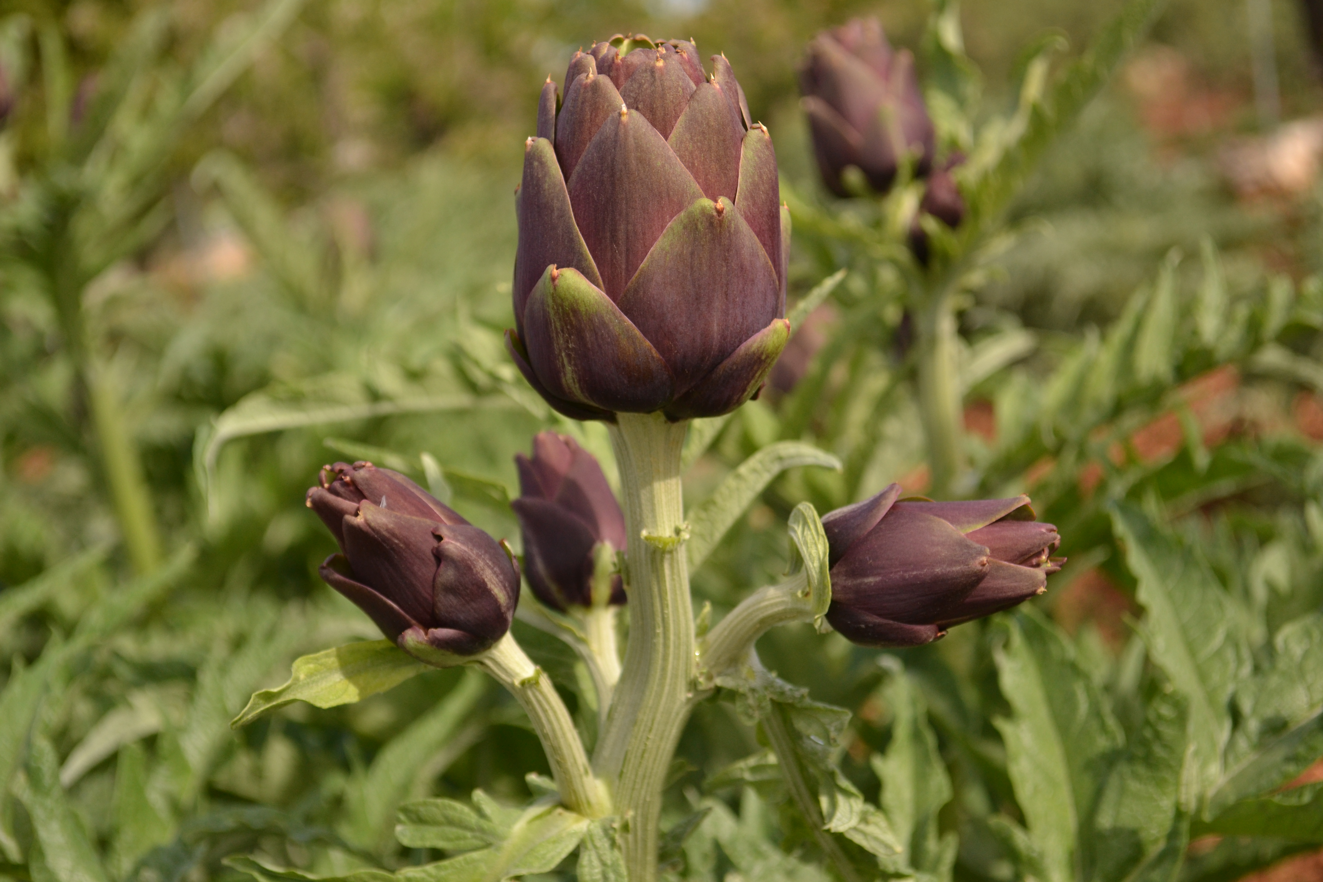 Carciofo Violetto di Putignano, inserito nell'elenco del PAT pugliesi.